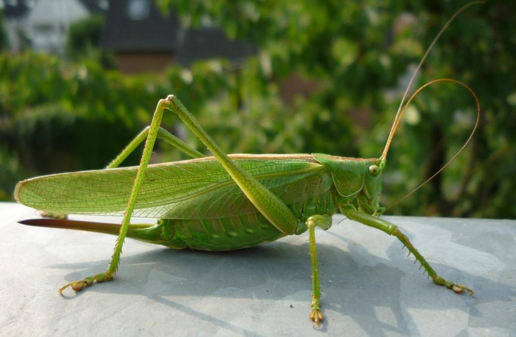 Grünes Heupferd, Tettigonia viridissima, Weibchen